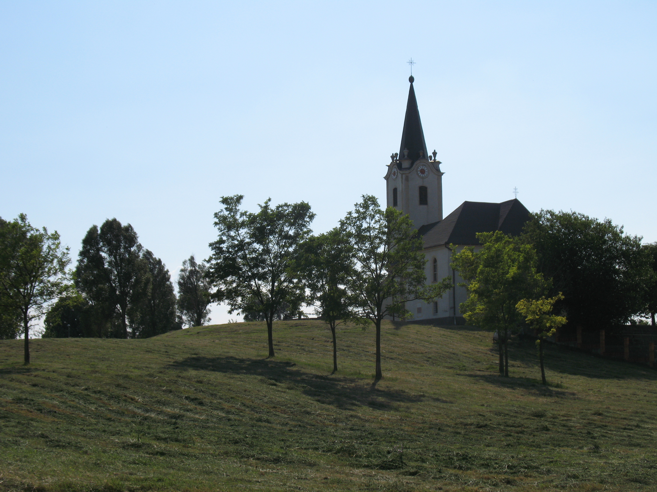 Bátorkeszi